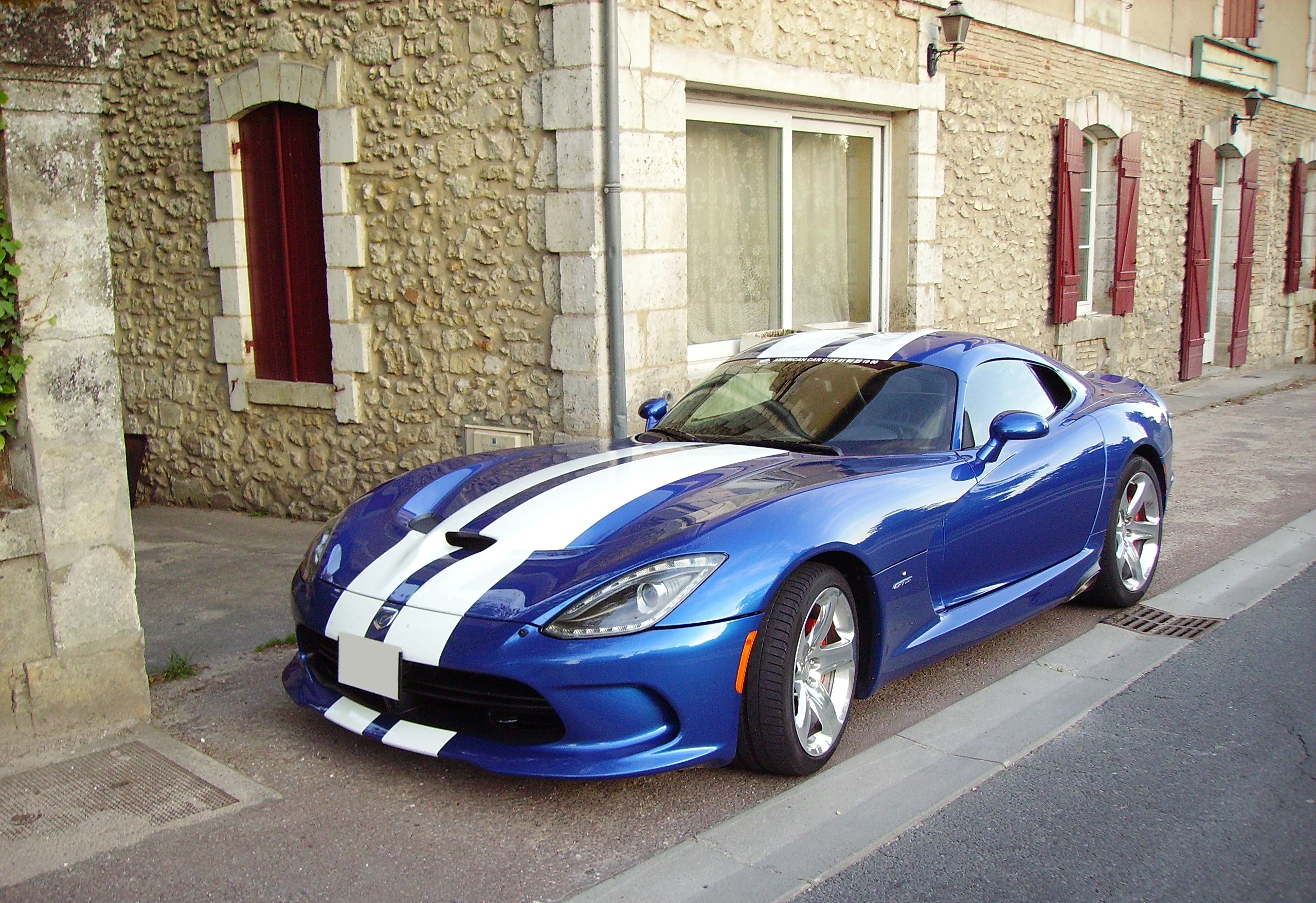 SRT Viper GTS, bleu/blanc.